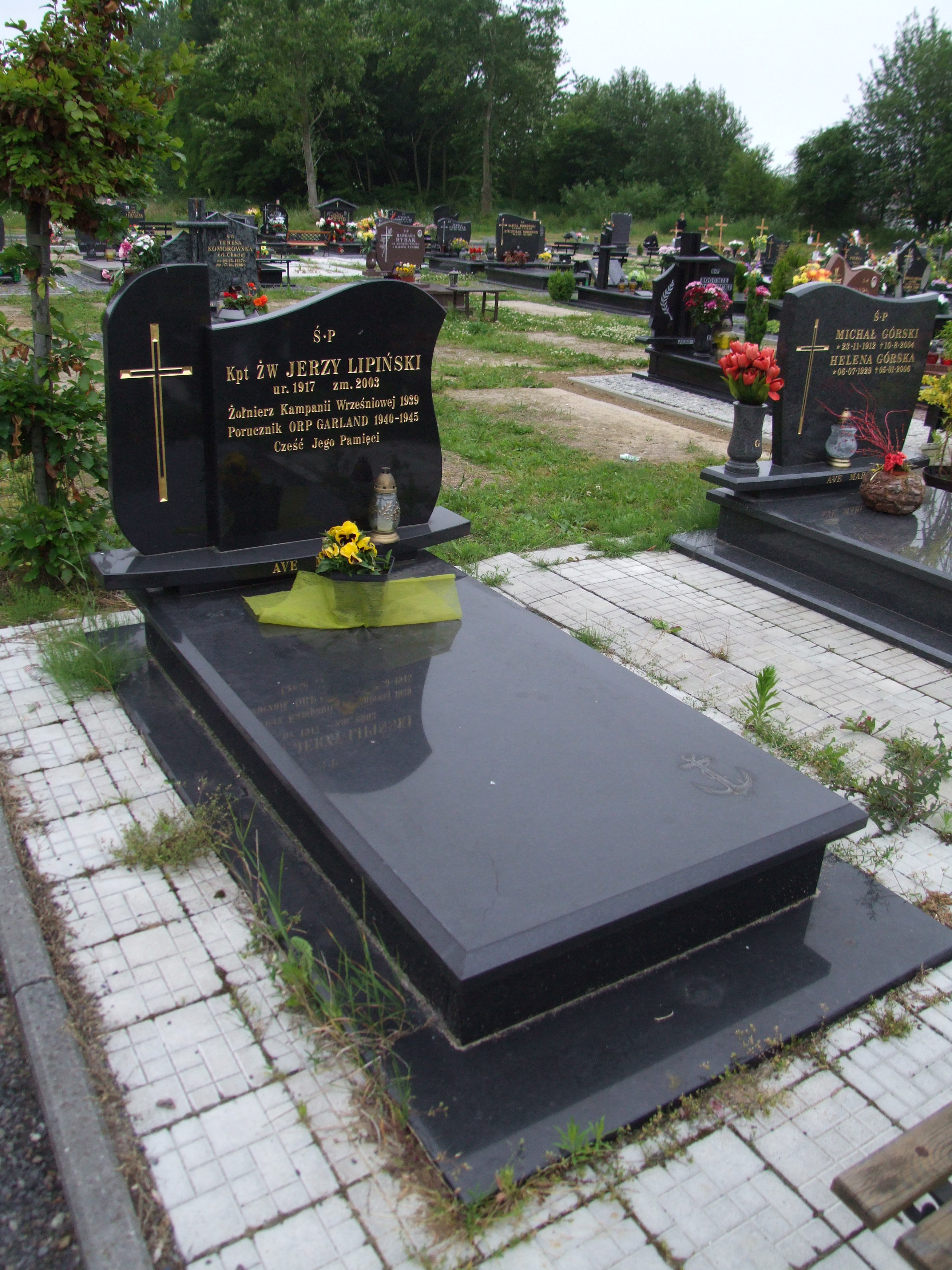 Gdynia-Oksywie Cmentarz Marynarki Wojennej